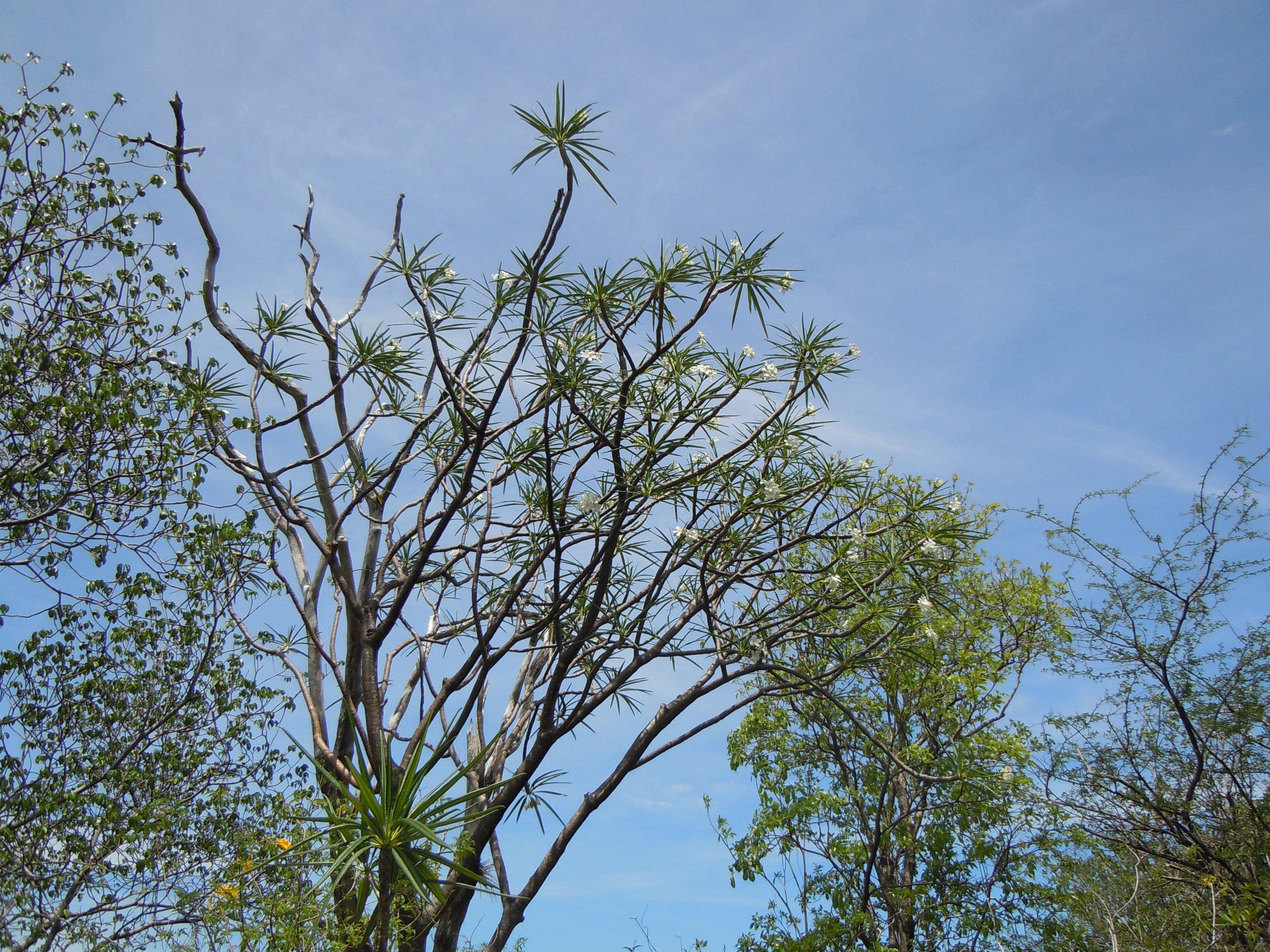 Îlets Pigeon: Frangipanier blanc (Plumeria alba) au sommet de Grand Îlet - Bouillante - la Guadeloupe